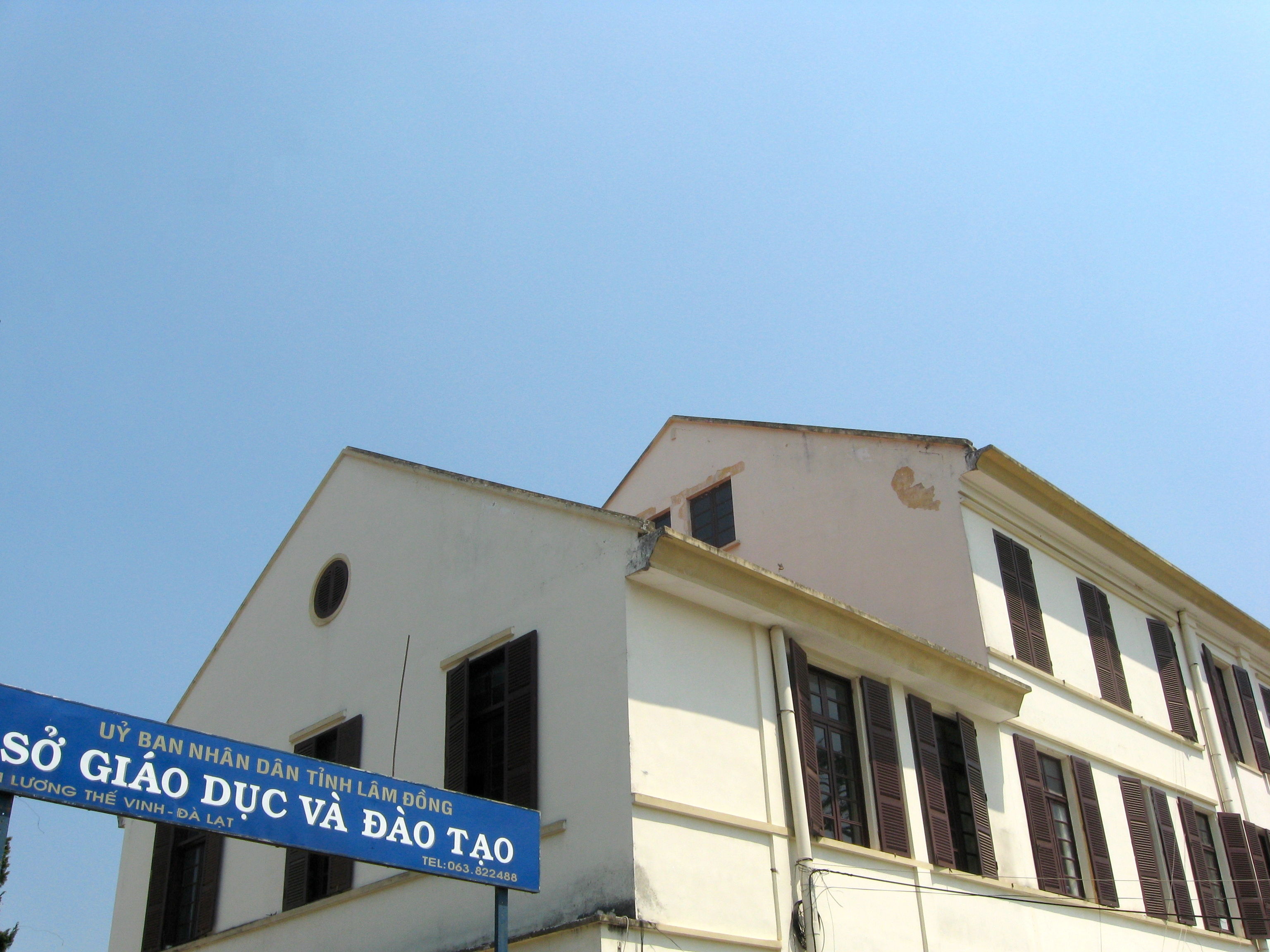 So giao duc va dao tao Lam Dong